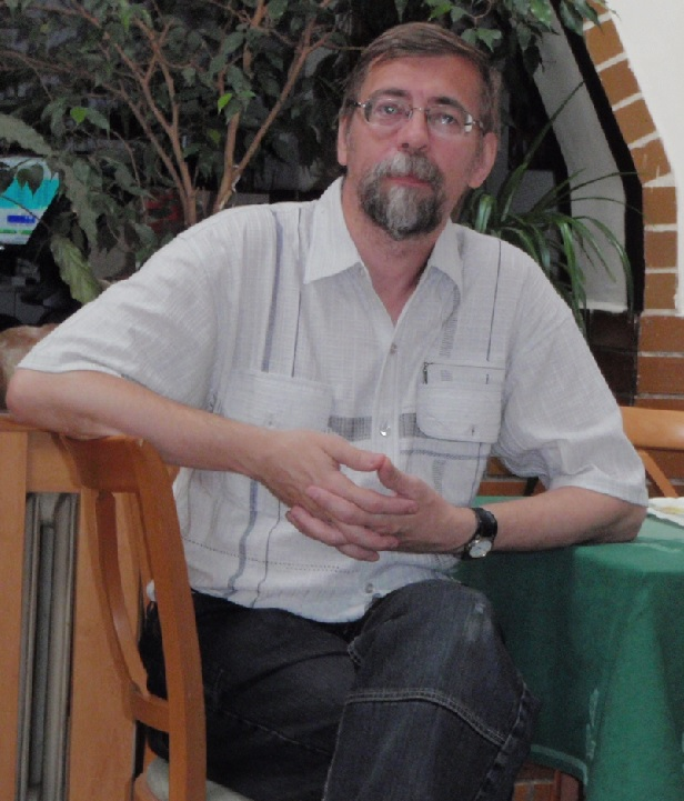 Josef Brtek